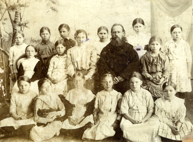 с. Ильинское